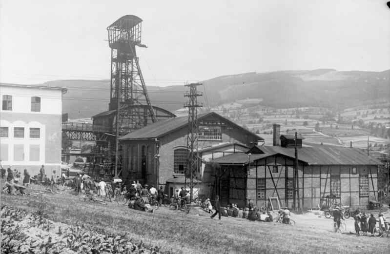 Der Unglücks-Schacht der Wenzeslausgrube in Neurode/Schlesien ! wo 150 Bergleute durch Ausbruch von Kohlensäure getötet wurden. Blick auf den Unglücksschacht mit der Förderanlage Wenzeslausgrube in Neurode am Tage des Unglücks.